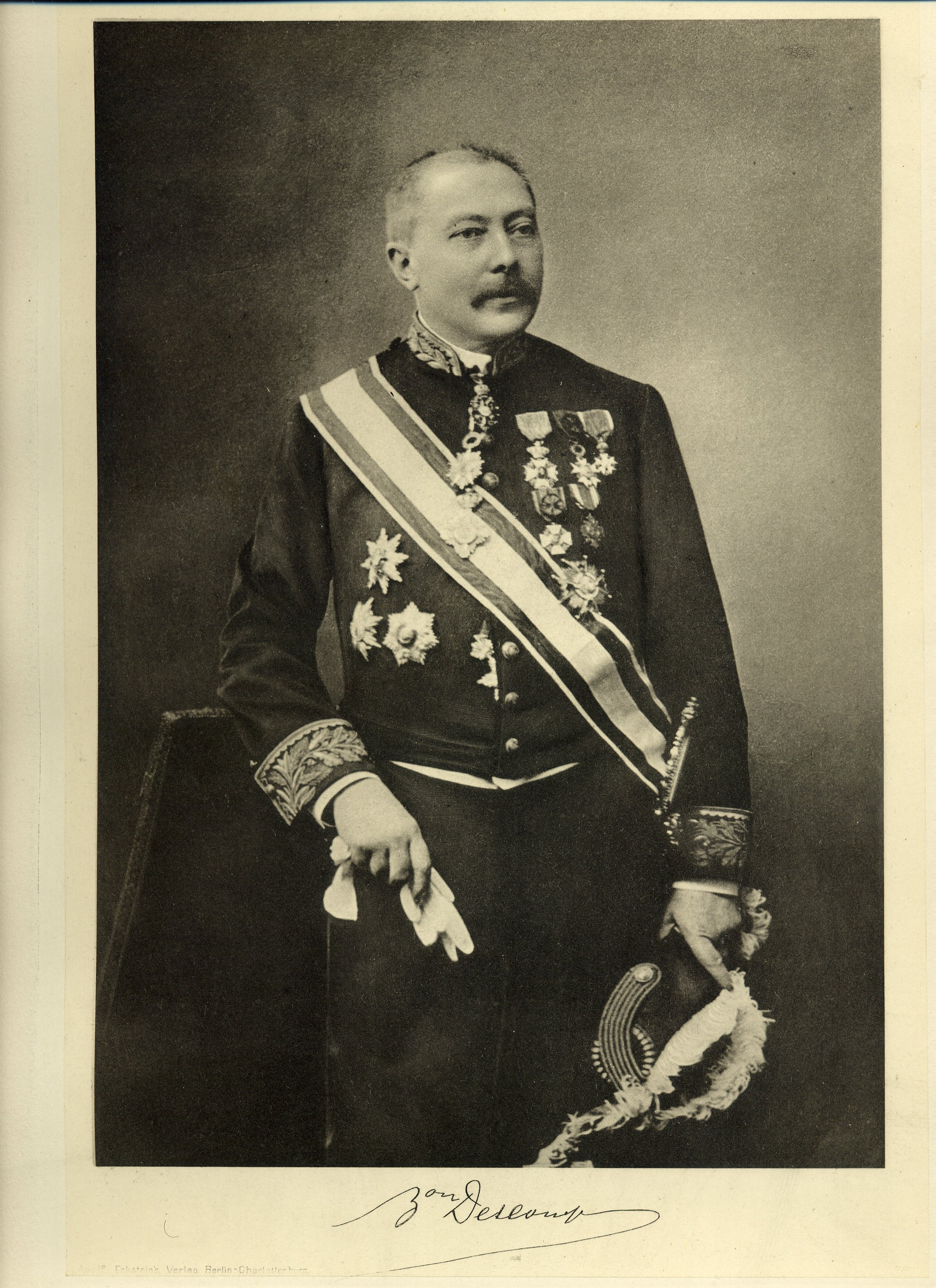 Portrait du Baron Descamps vers 1900 paru dans "La Belgique d'aujourd'hui", sous la direction de Gustave DELTOUR, Berlin-Charlottenburg, Adolf Eckstein, vers 1908. Scannée et mise en forme par Henrotte Damien le 13 janvier 2007.